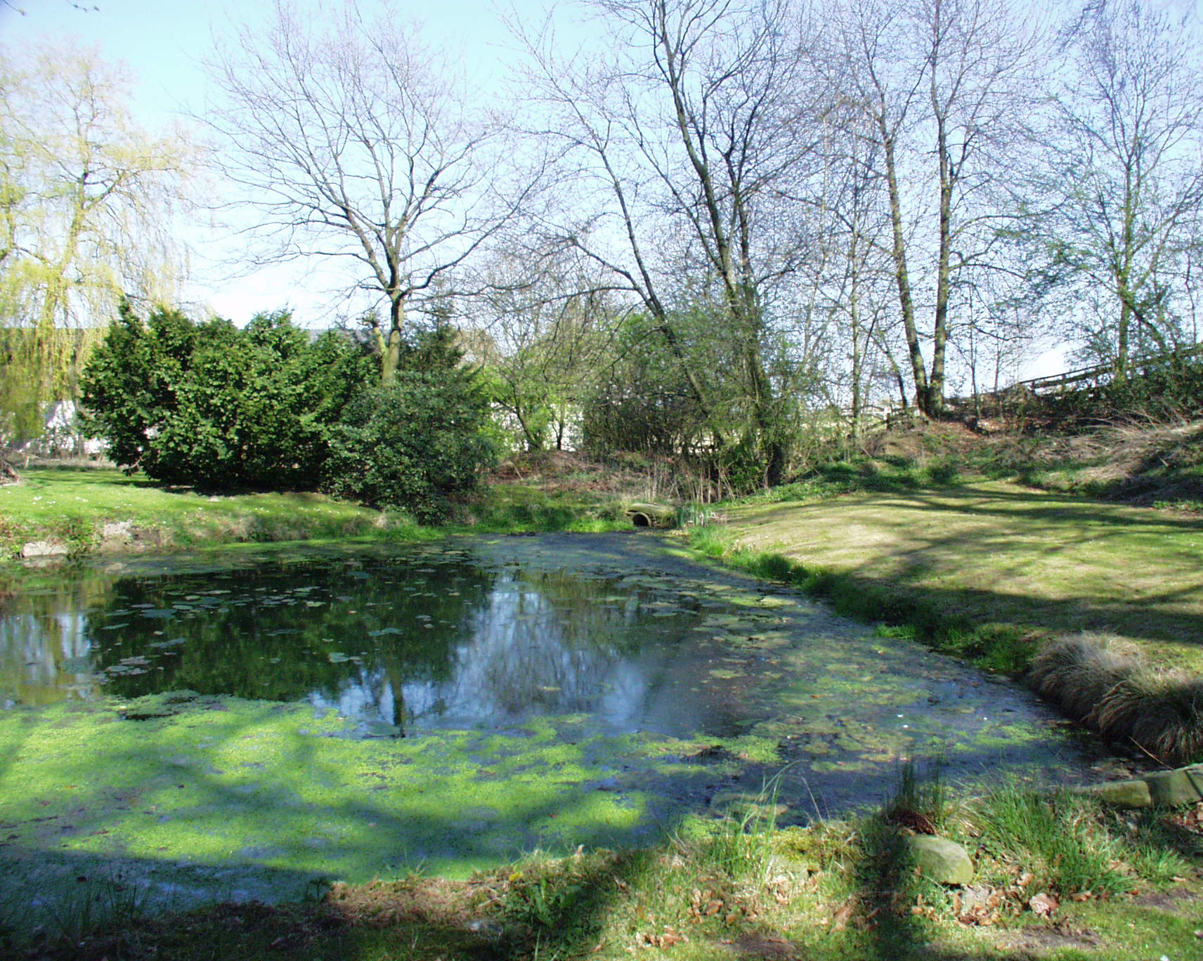 Emscherquellhof in Holzwickede